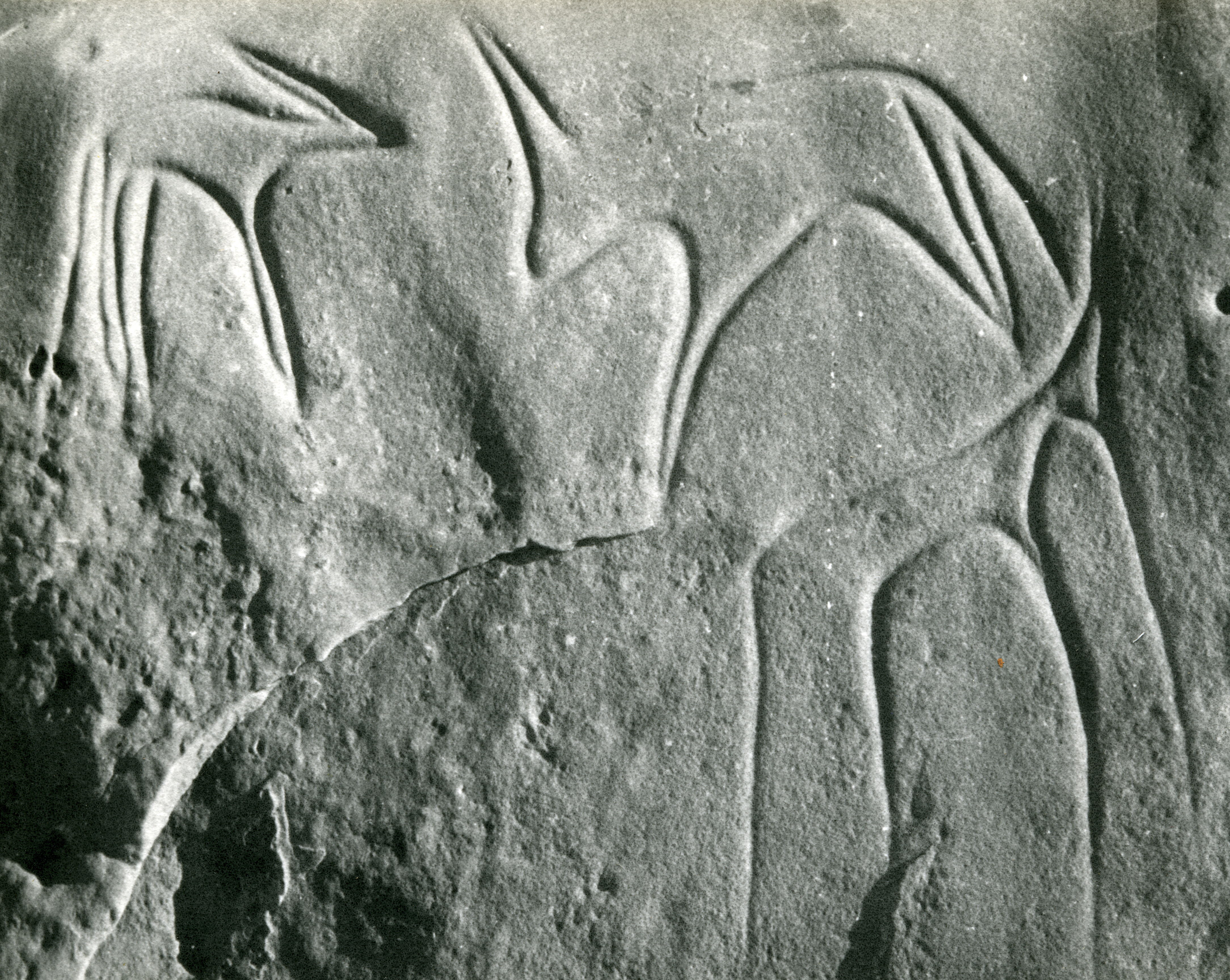 gravure préhistorique de la région d'El Bayadh (Algérie)